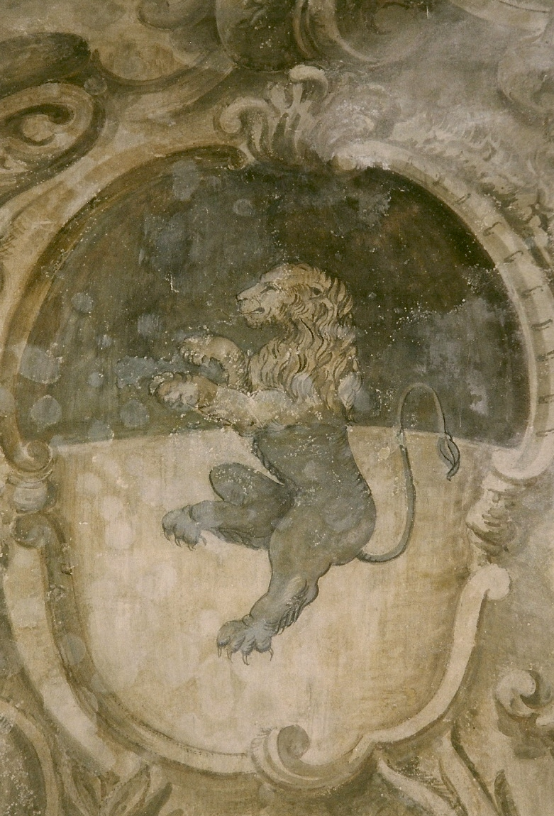 Emblème Pisani